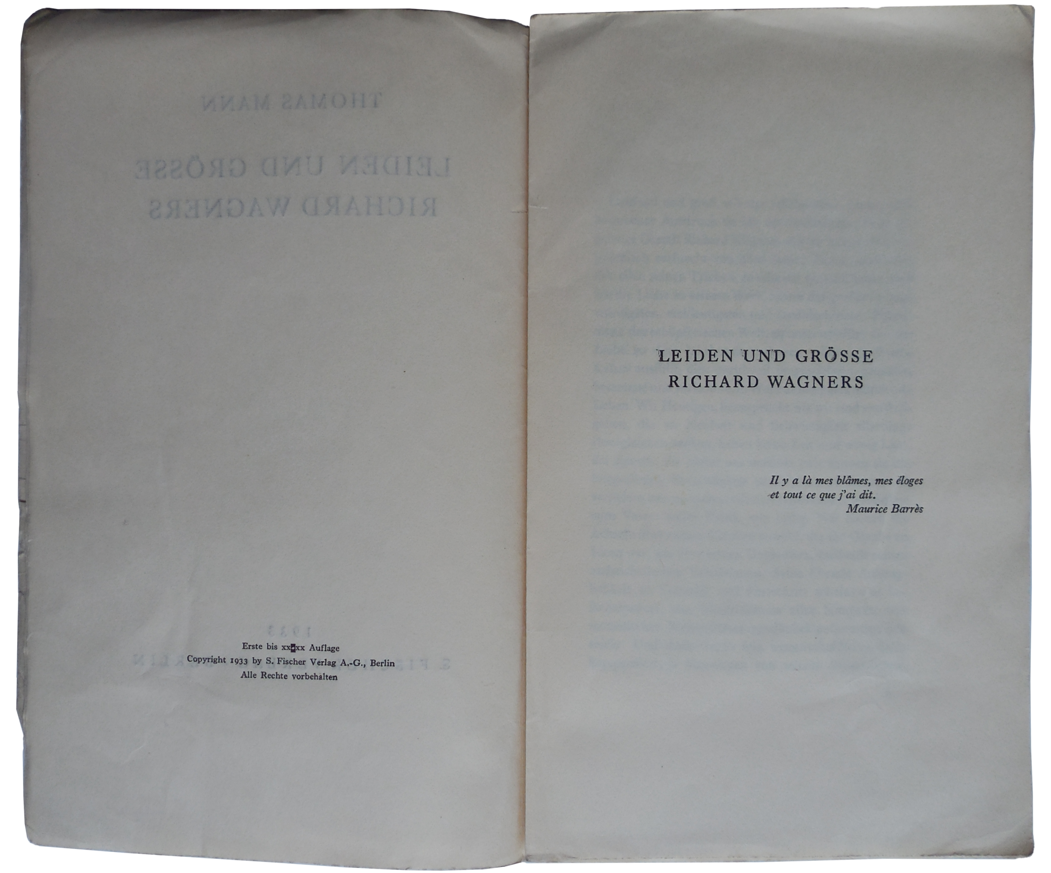 Leiden und Groesse Richard Wagnerers Thomas Mann 1933 verso Titel